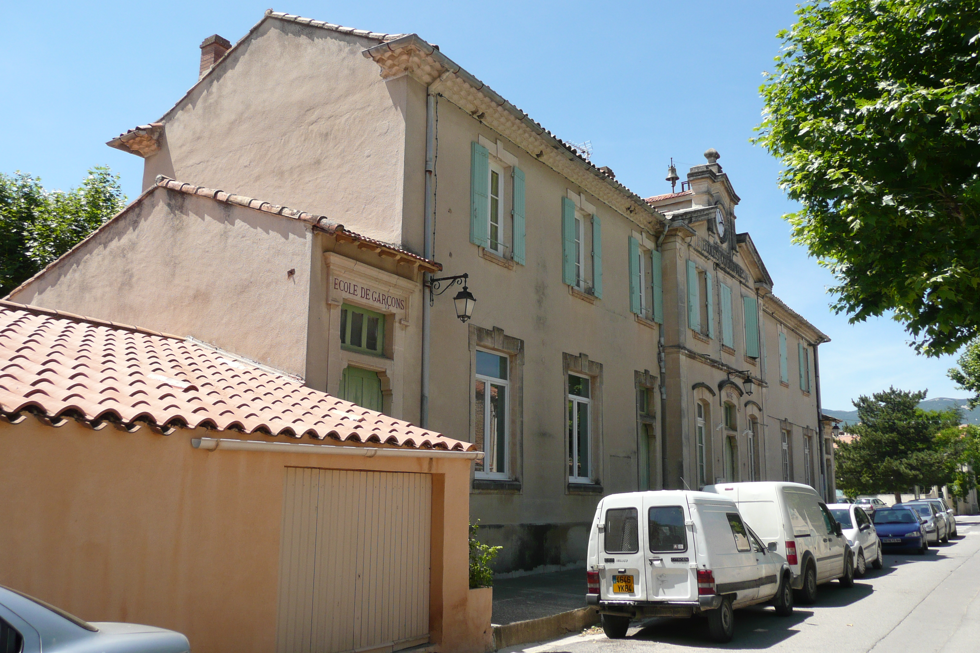 Ecole à Saint-Martin-de-la-Brasque.